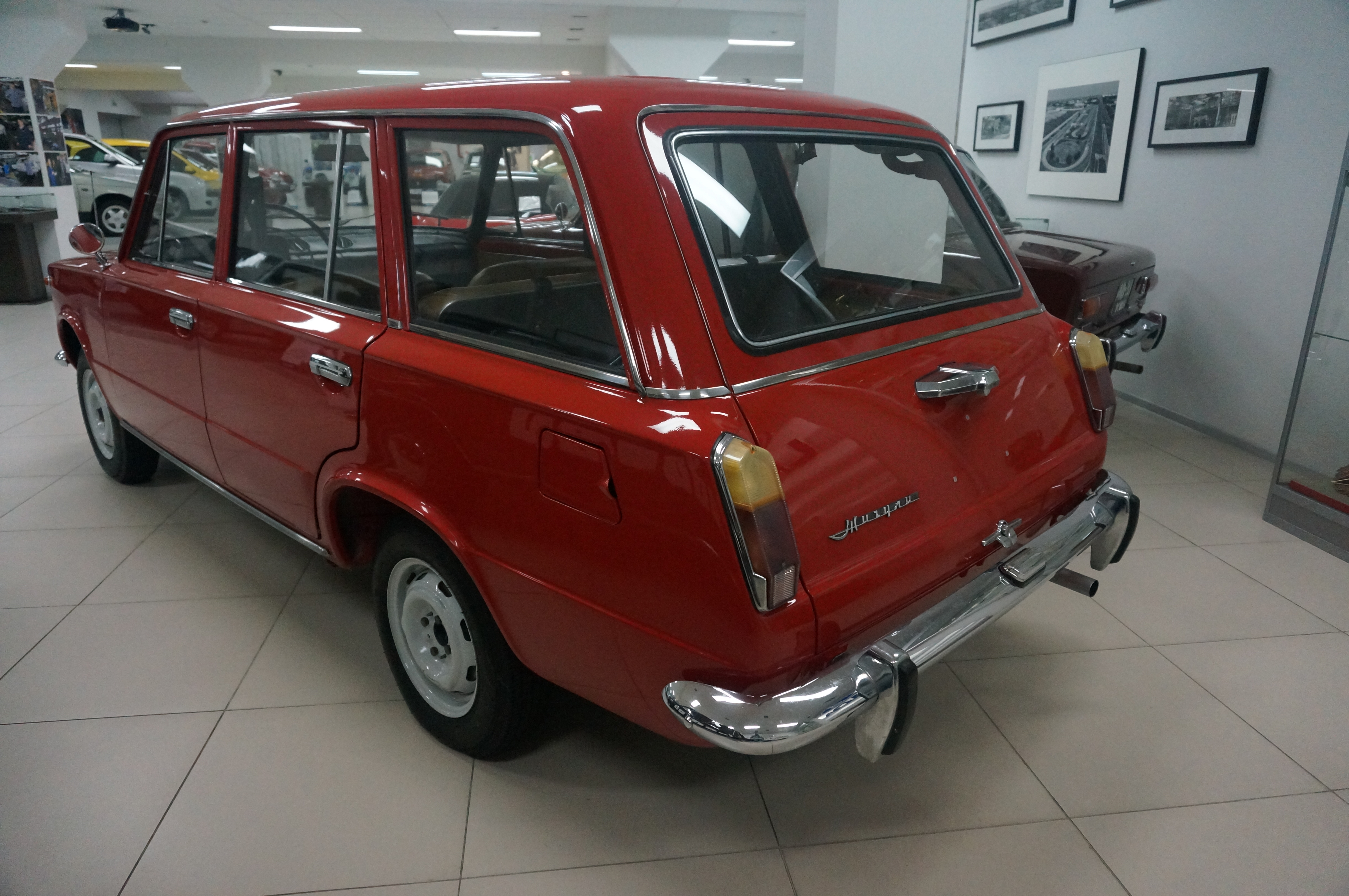 ВАЗ 2102 в музее АвтоВАЗа. Собран в 1974 году. Подарен музею профсоюзом автозавода. Не подвергался капитальному ремонту, имеет оригинальные кузов, кузовные детали, двигатель. Общий пробег 110,6 тыс. км